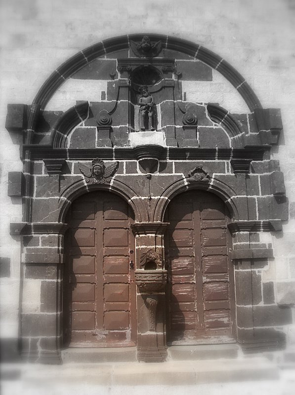 église Irvillac, denez goasguen.